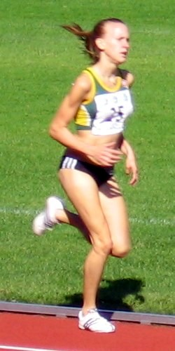 Sandra Eriksson yleisurheilun 22-vuotiaiden SM-kisoissa Porin stadionilla